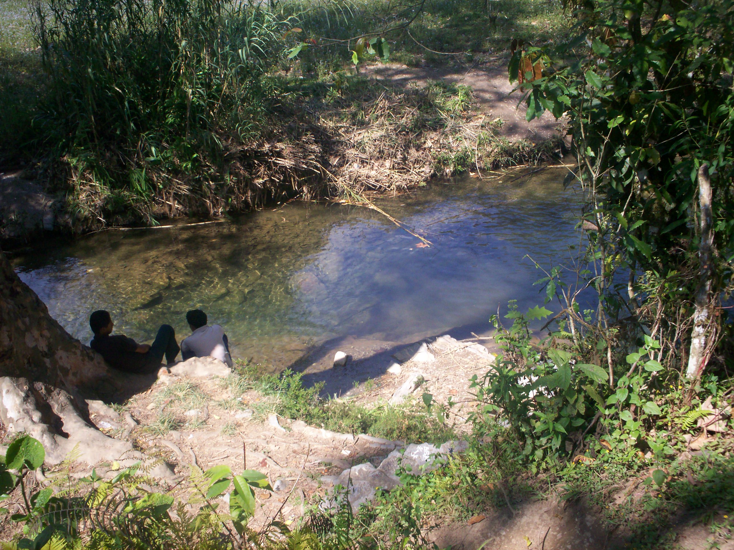 Uno de los afluentes del río Petlapa, cerca del límite entre Puebla y Oaxaca (Mëxico). Este río forma parte de la cuenca del Papaloapan.